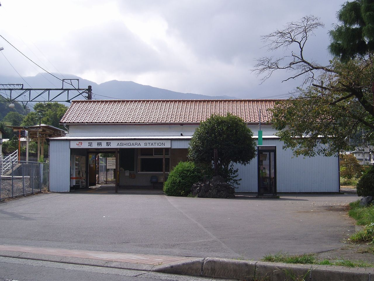 Ashigara Station in Oyama Town, Shizuoka, Japan